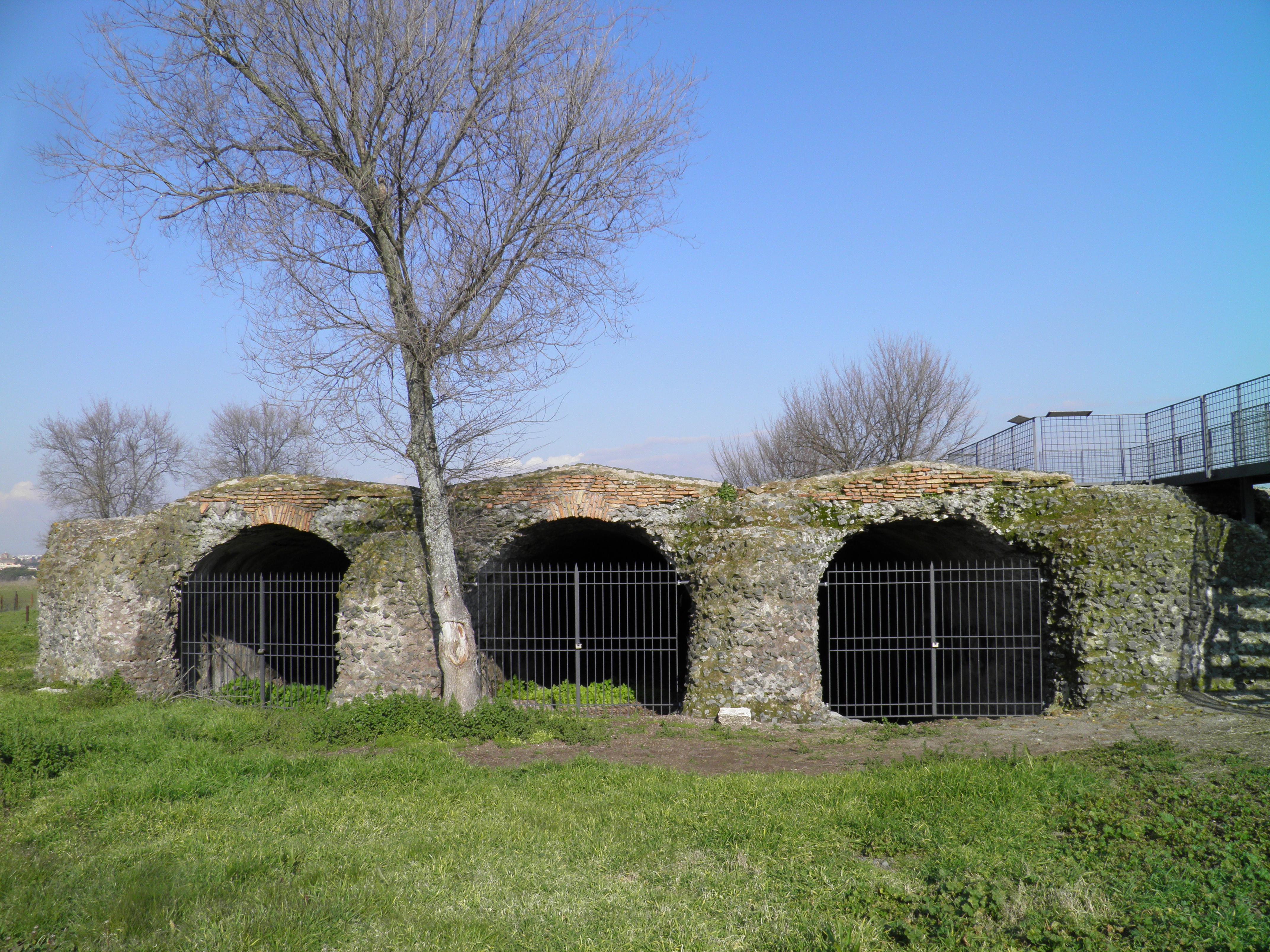 Villa of the Quintili, Via Appia, Rome